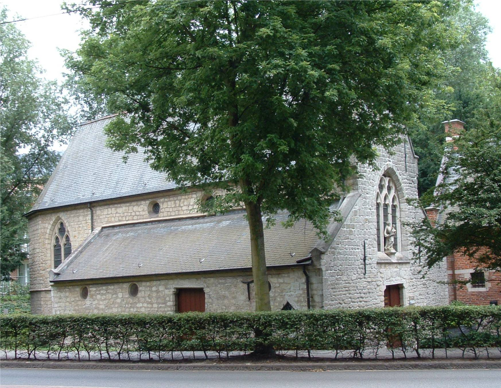 Kapel van Stalle, Ukkel, België